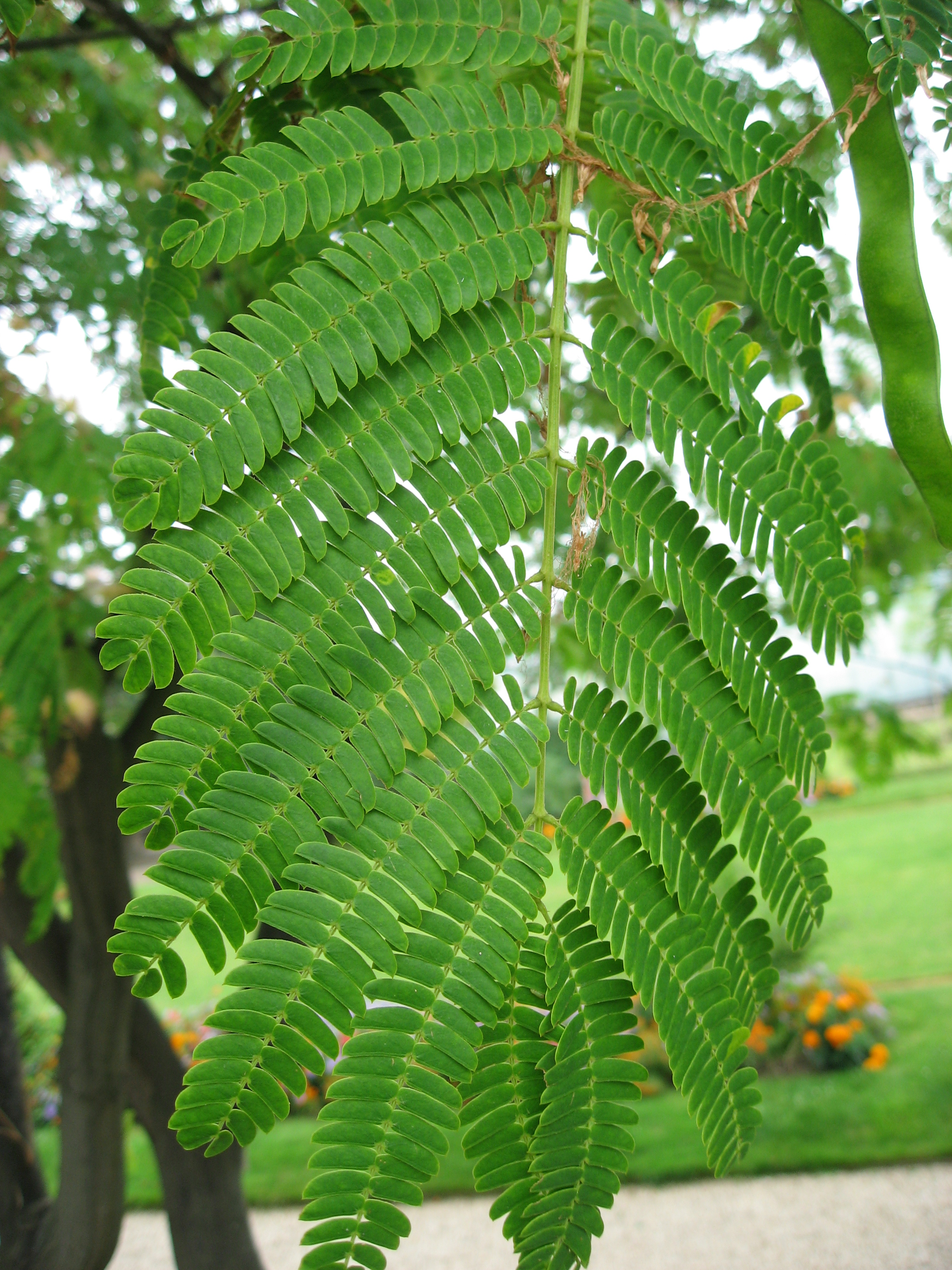 Albizia julibrissin in Serres d'Auteuil